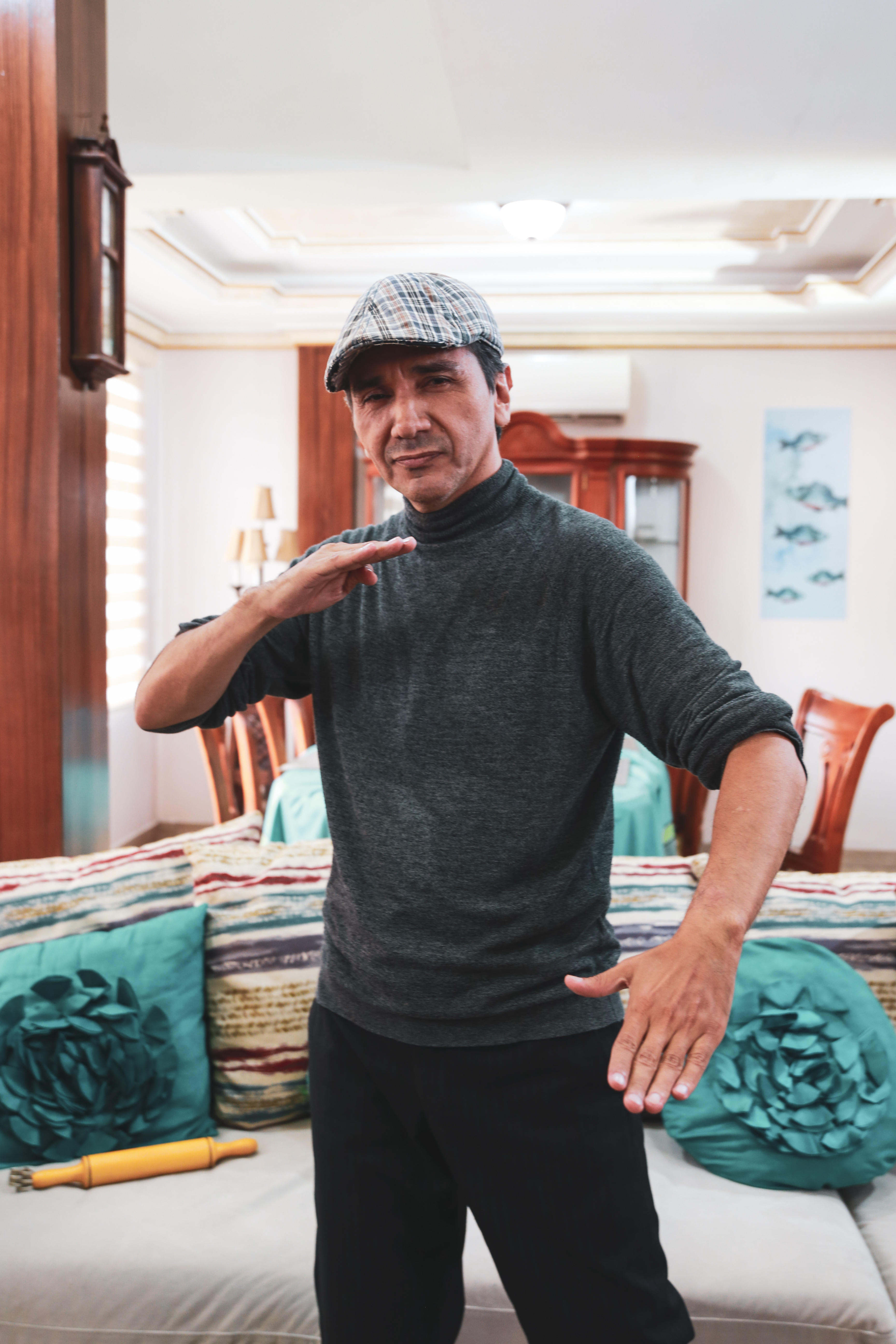 Jorge Toledo como Perico en 2019, para la serie de RTS, Amo de casa.